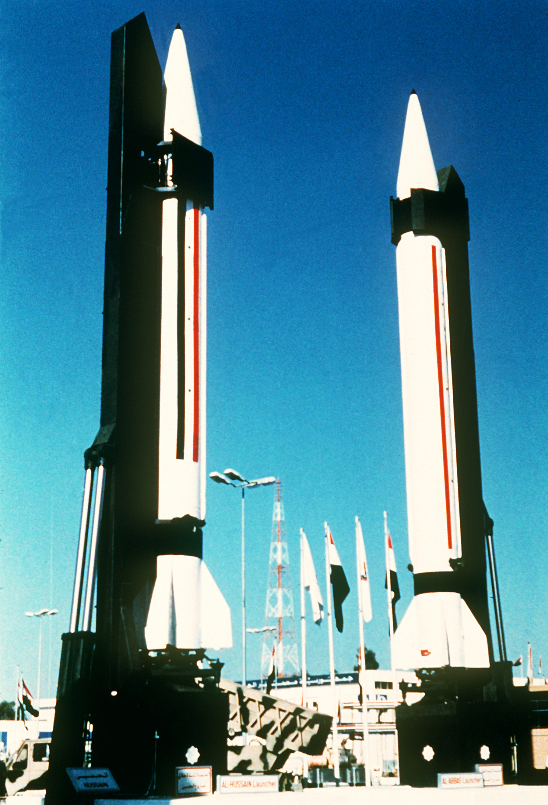 Two Soviet built, Iraqi-modified Al-Hussein missiles displayed with their erector-launchers at the 1989 Baghdad arms exhibition.